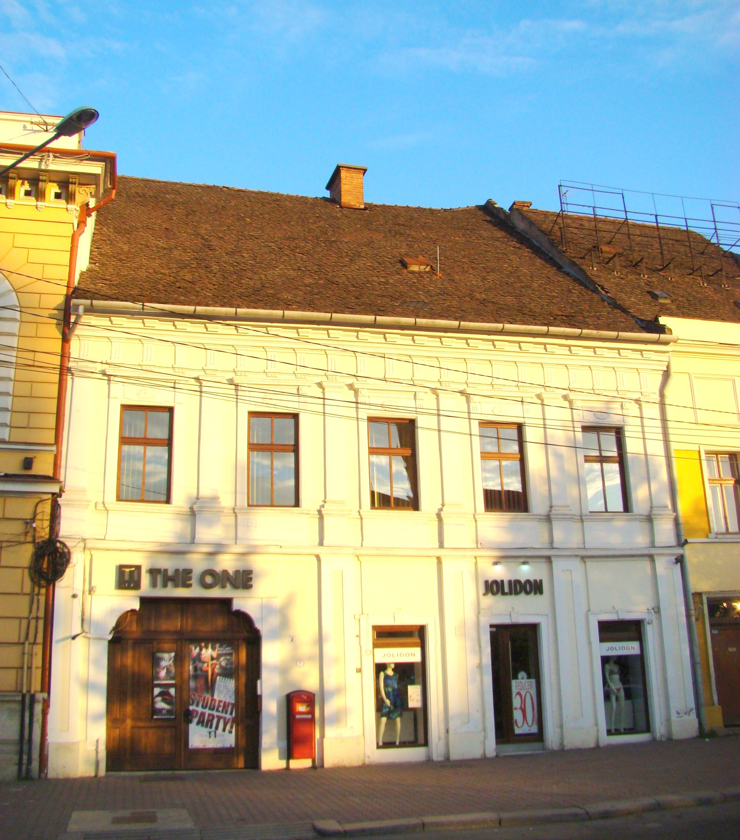 Clădire monument istoric, Piața Unirii, nr.2